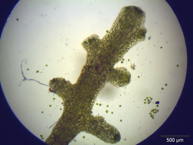 Buchtiges Riccardimoos (Riccardia chamedryfolia), Thallus, Vergrößerung: 40x